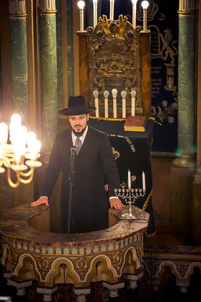 הרב שמשון דניאל איזקסון רבה הראשי של וילנה בנאום ההכתרה שלו בבית הכנסת הגדול בעיר